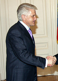 Volodymyr Lytvyn, Ukrainian politician